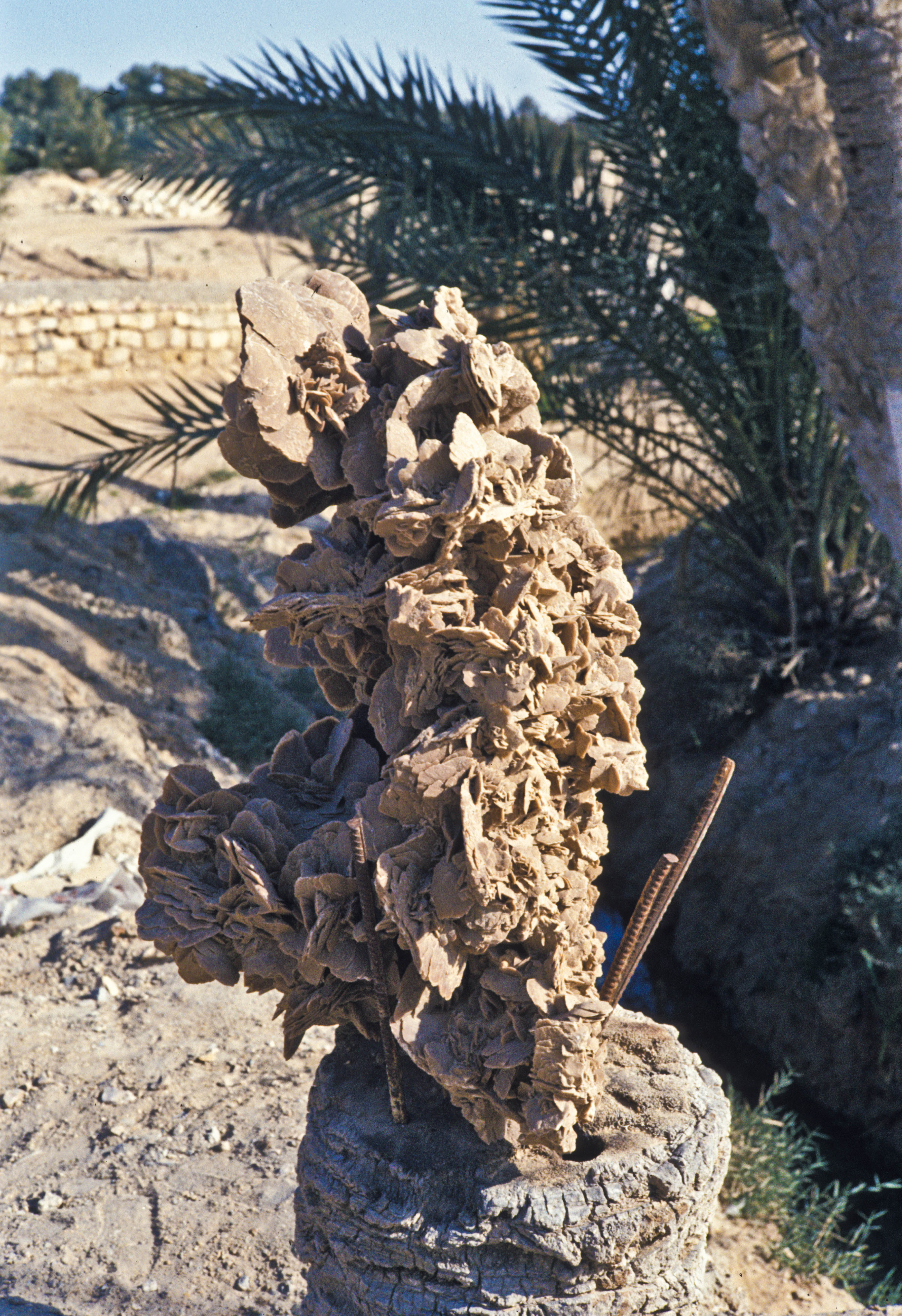 Tunisia